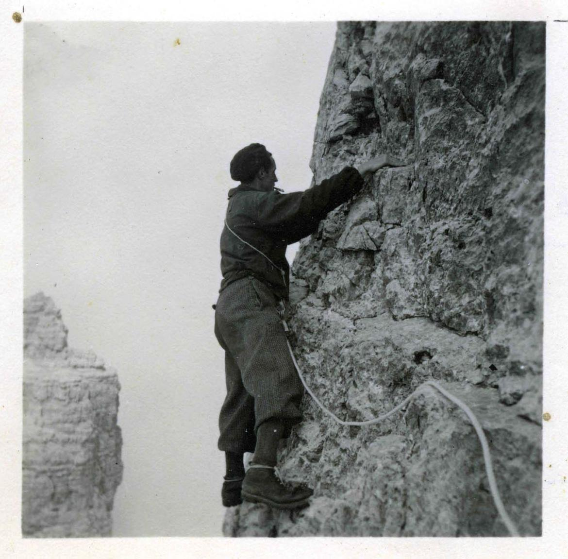 Bruno Detassis arrampicata prima della II guerra mondiale